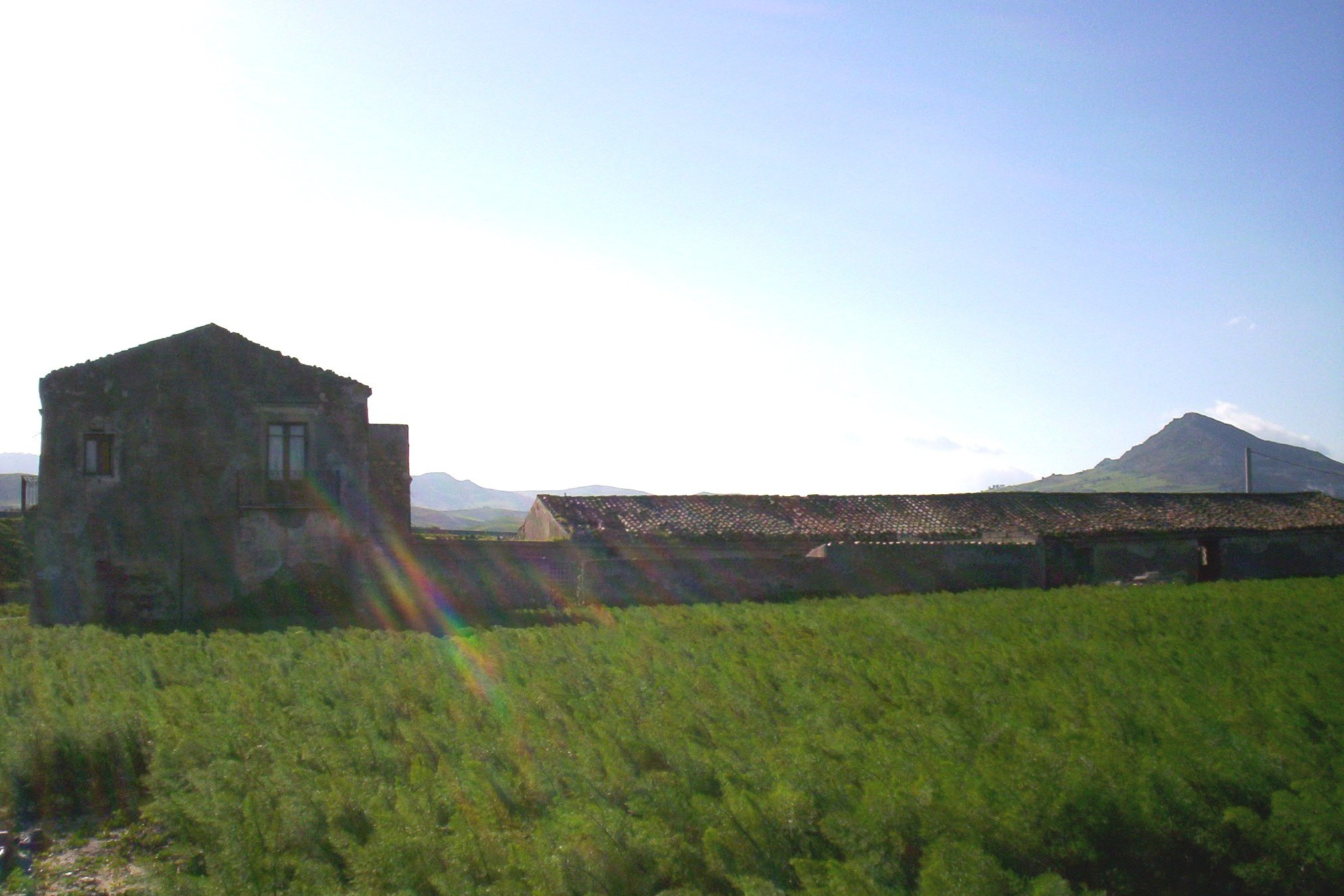 Autore e Fonte: Nicolò Fiorenza; Descrizione: Fondaco Cuba Catenanuova; Licenza d'uso